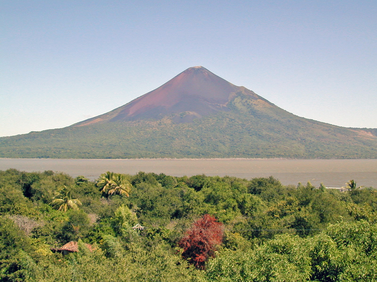 Le volcan Momotombo (1258 m) et le lac de Managua au Nicaragua dont le niveau est resté très élevé depuis le passage de l'ouragan Mitch en 1998. La dernière éruption du Momotombo date de 1905.